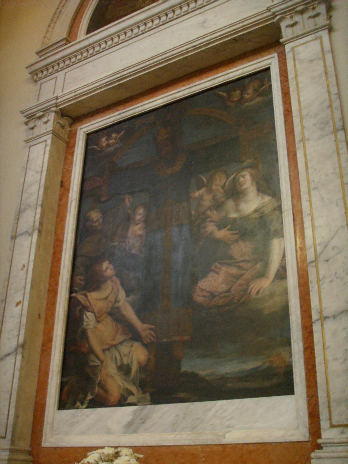 Viareggio, chiesa di san paolino, paolo biancucci, santi adorano il volto santo di lucca